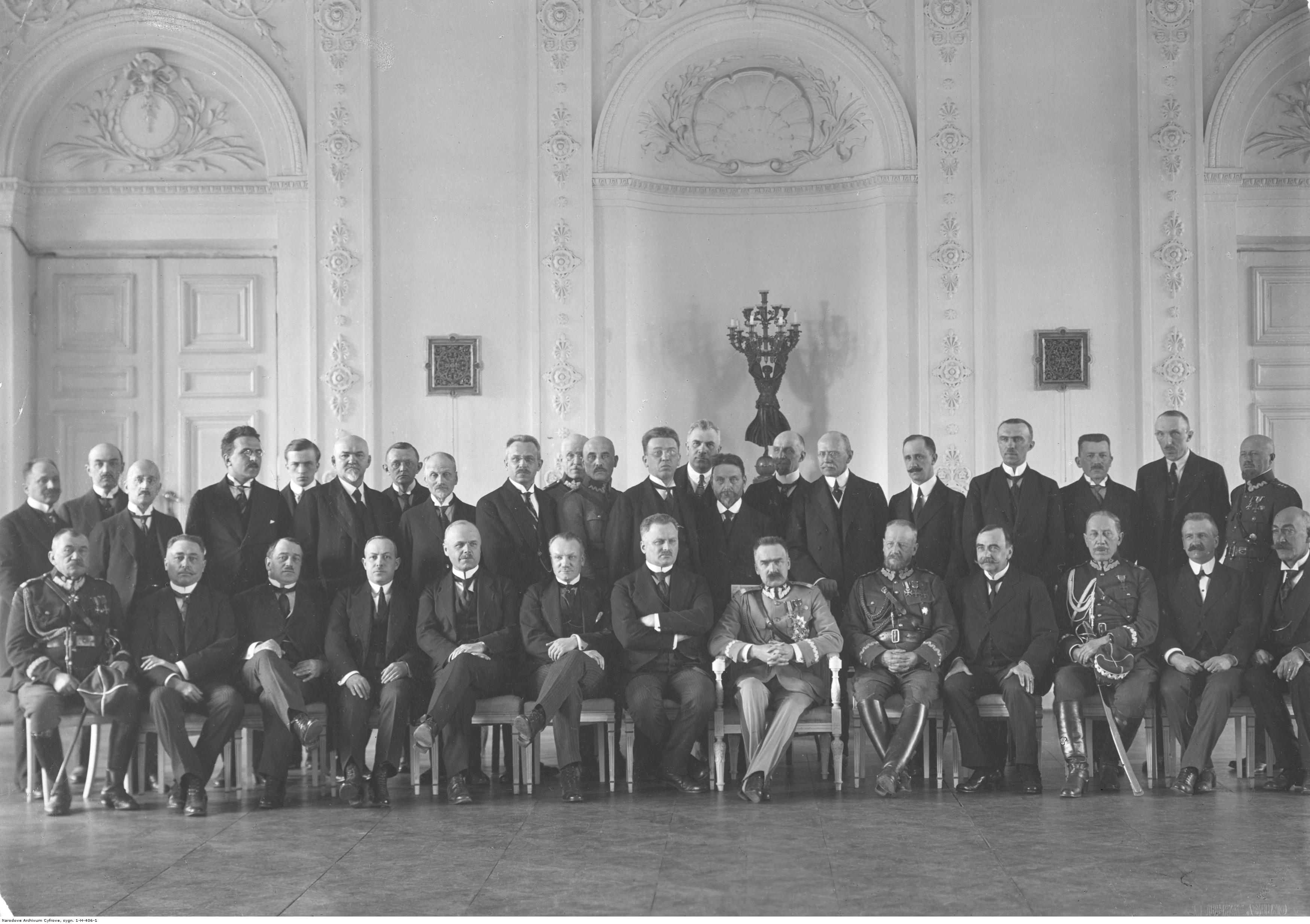 Uroczystości z okazji przyłączenia Wileńszczyzny do Polski; Wilno 18 kwietnia 1922. Przedstawiciele rządu polskiego i członkowie Tymczasowej Komisji Rządzącej Litwy Środkowej z Józefem Piłsudskim (siedzi 6. z prawej) - fotografia grupowa. Widoczni: generał Lucjan Żeligowski (siedzi 5. z prawej), generał Stefan Mokrzecki (siedzi 3. z prawej), kapitan Aleksander Prystor (stoi 1. z prawej), generał Jan Rządkowski (siedzi 1. z lewej), Aleksander Meysztowicz, Witold Abramowicz, premier Antoni Ponikowski (siedzi 7. z lewej), minister spraw wewnętrznych Antoni Kamieński, minister pracy i opieki społecznej Ludwik Darowski, minister zdrowia publicznego Witold Chodźko. Koncern Ilustrowany Kurier Codzienny - Archiwum Ilustracji. Sygnatura: 1-H-406-1